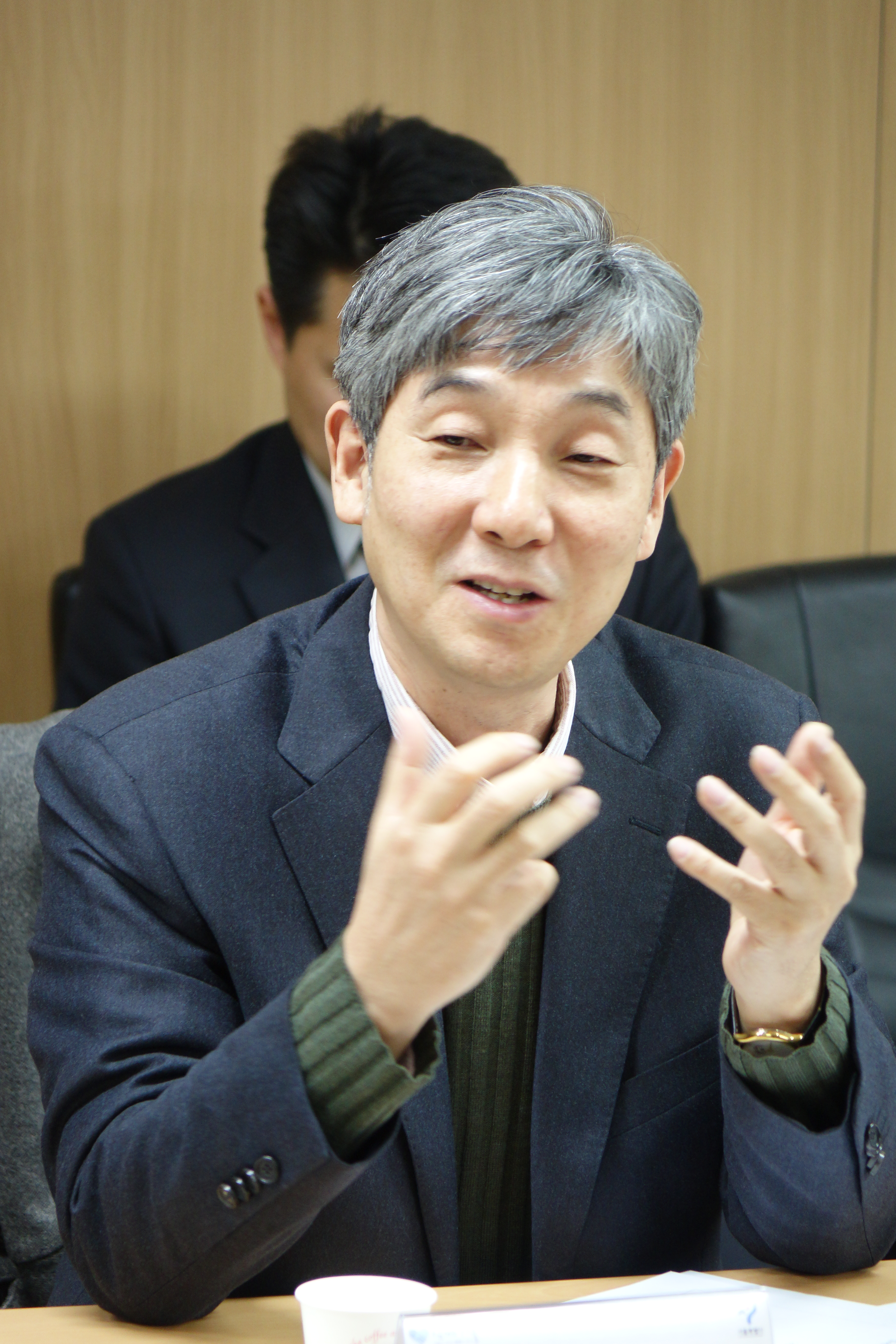 이동수, 2015년 3월 서울특별시 중구 서울소방재난본부 시민안전파수꾼 자문위원 회의